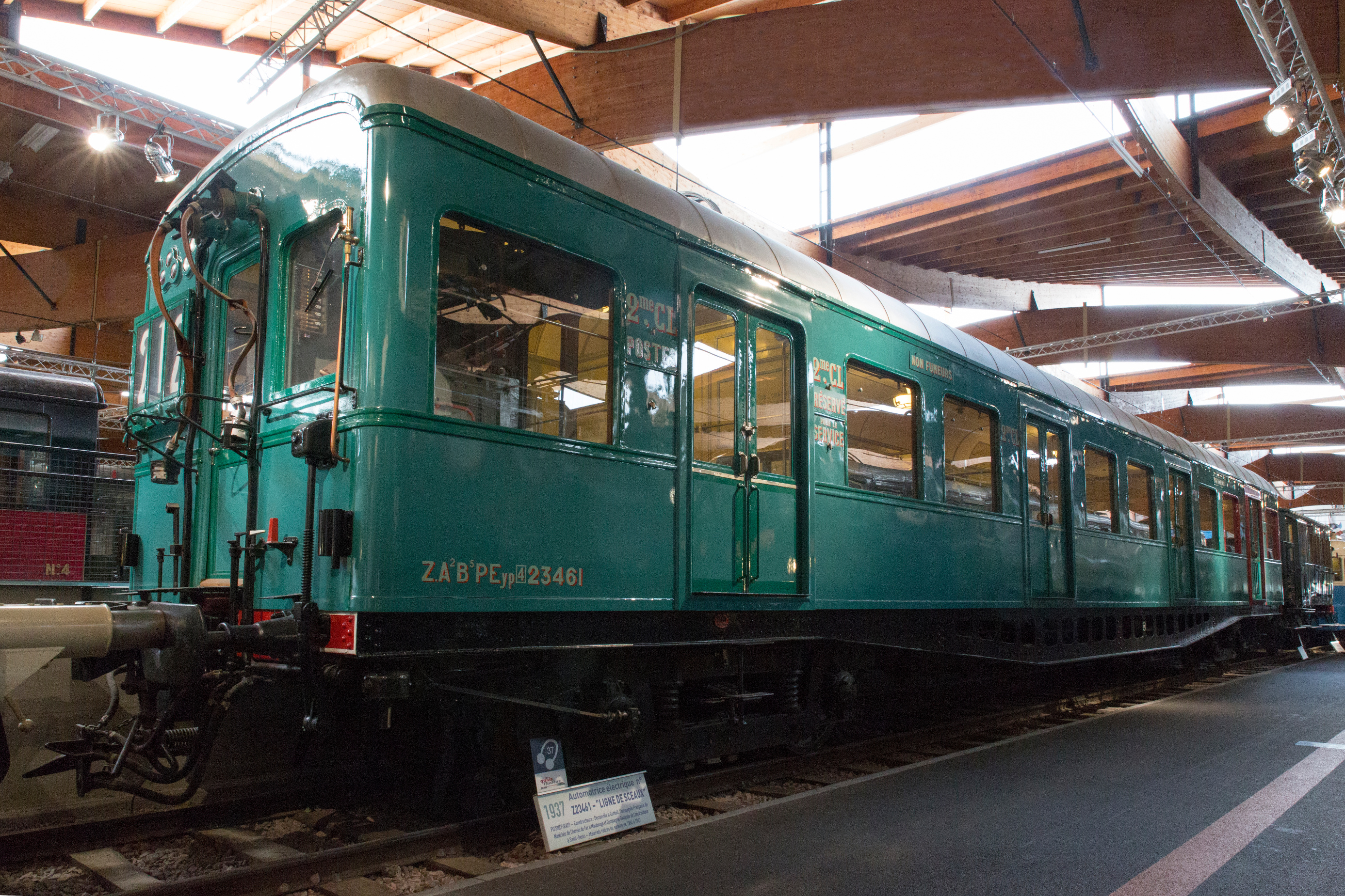 L'automotrice Z 23461, future Z 3411, conservée à la cité du train.